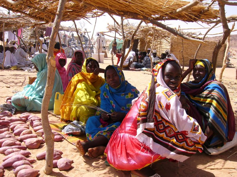 Darfur refugee women in Chad